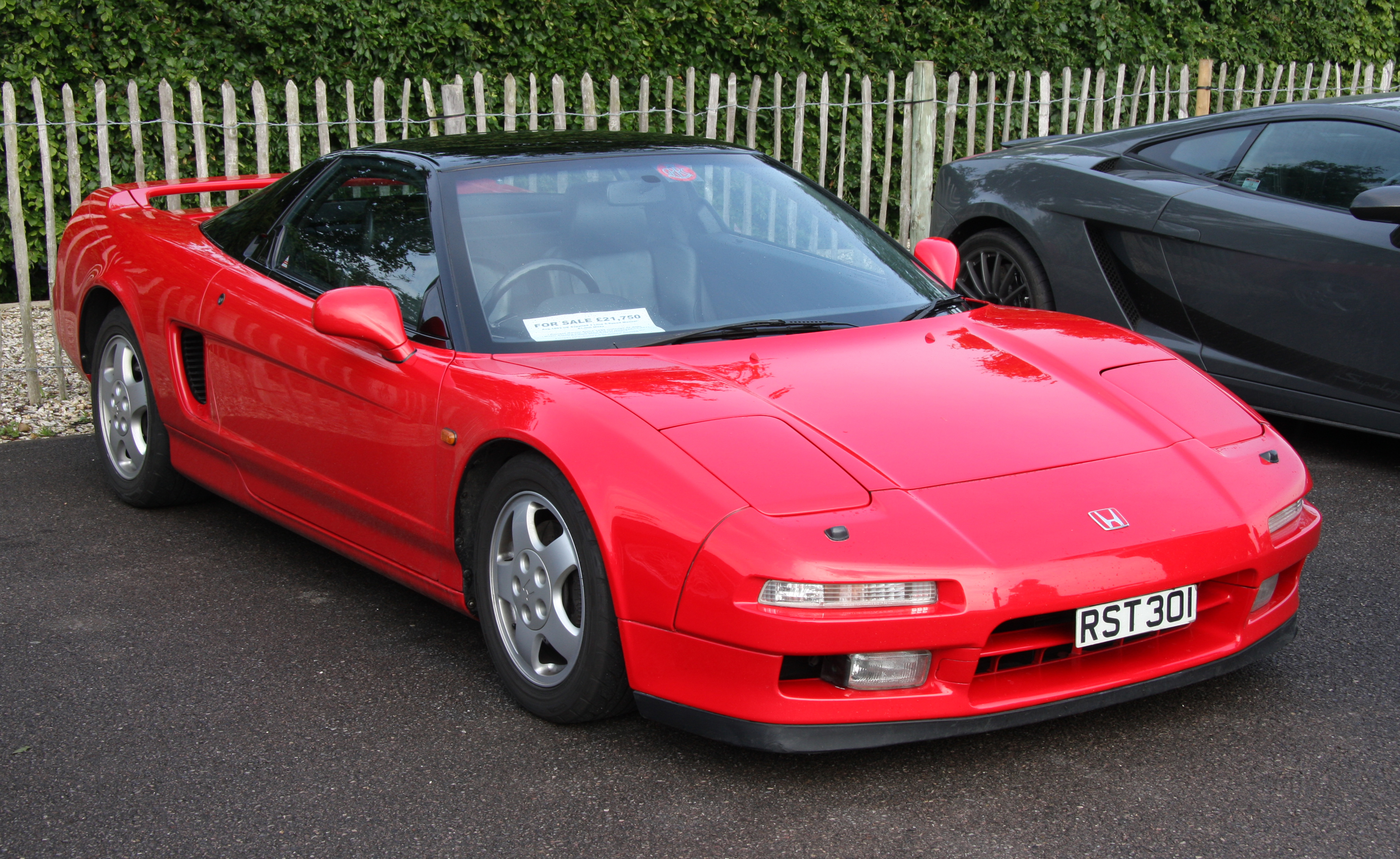 Honda NSX.